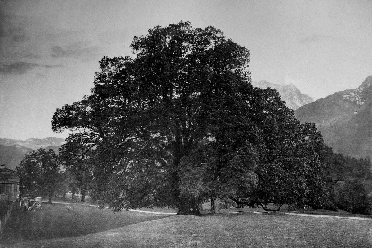 Hindenburglime at Ramsau